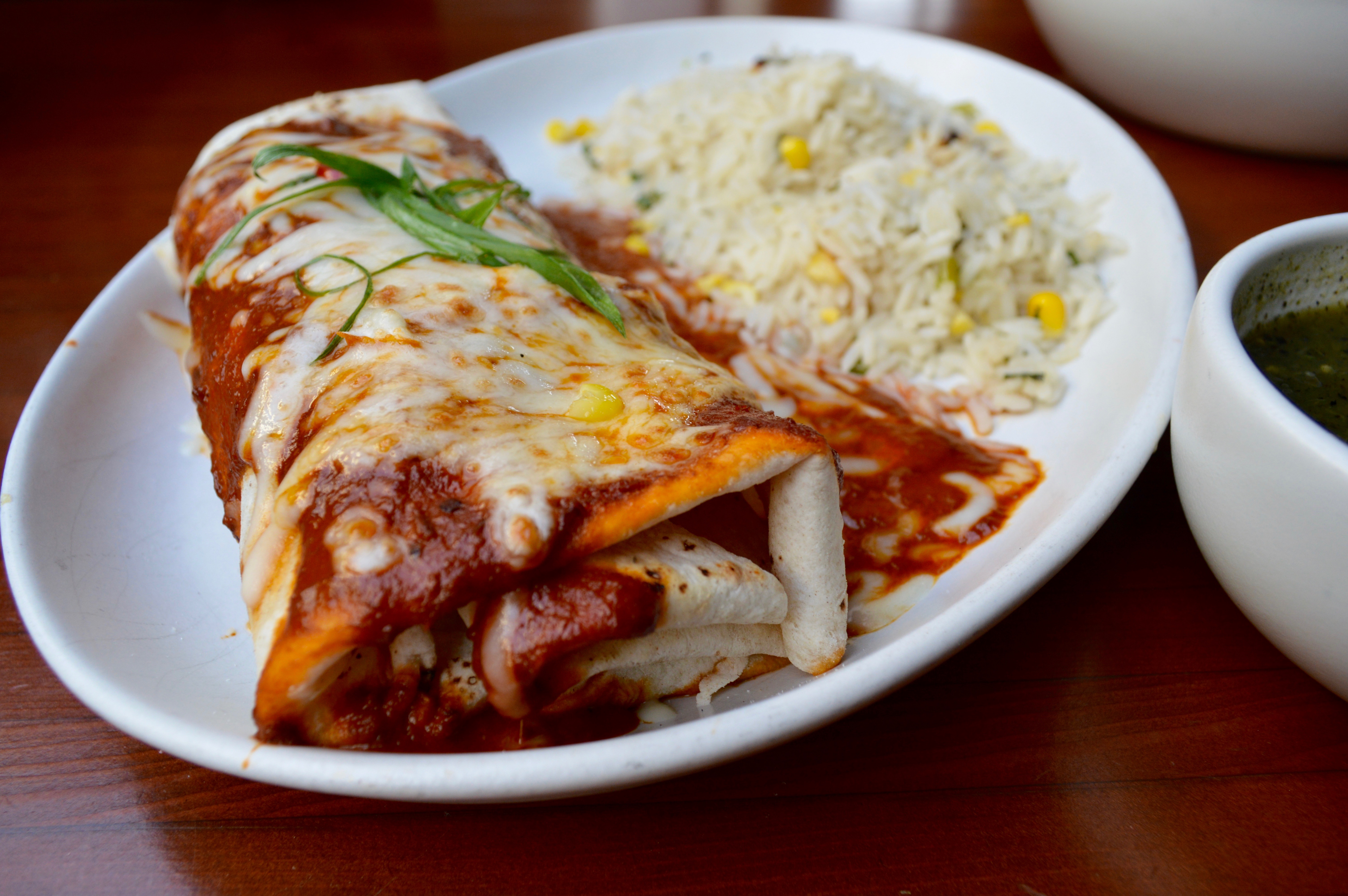 Blanco Tacos + Tequila + Hornitos